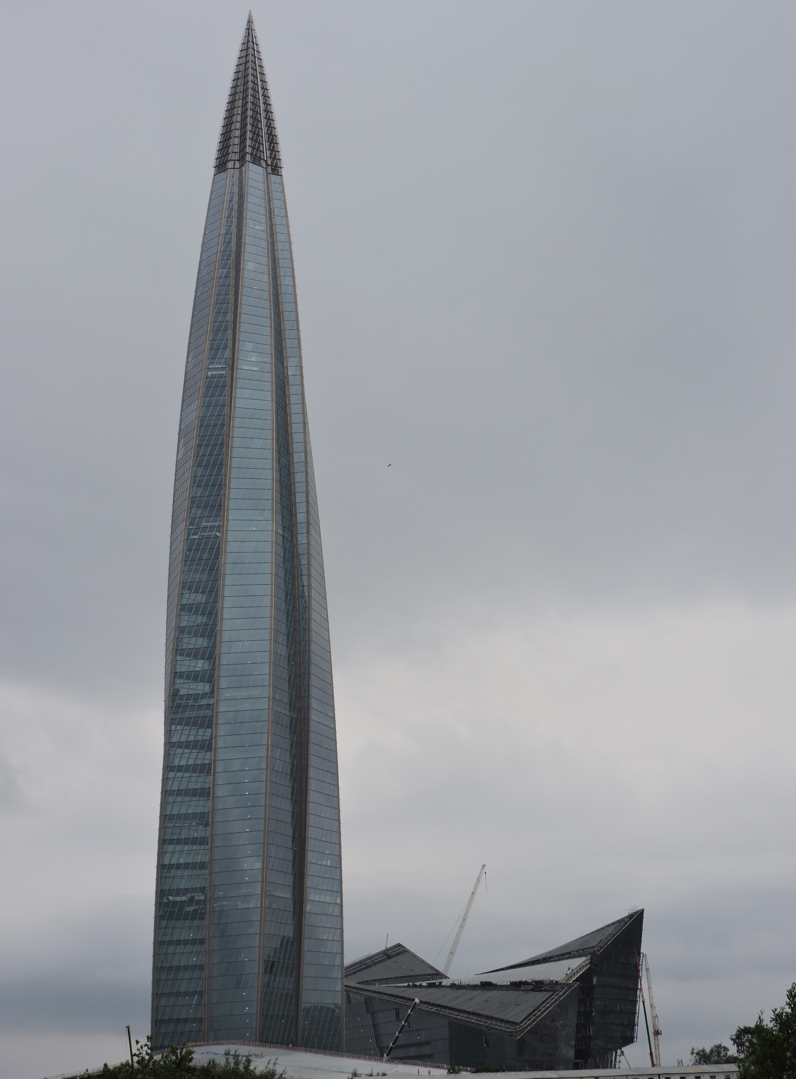 Лахта-центр